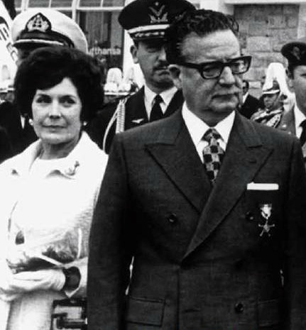 Salvador Allende acompañado de su esposa Hortensia Bussi.